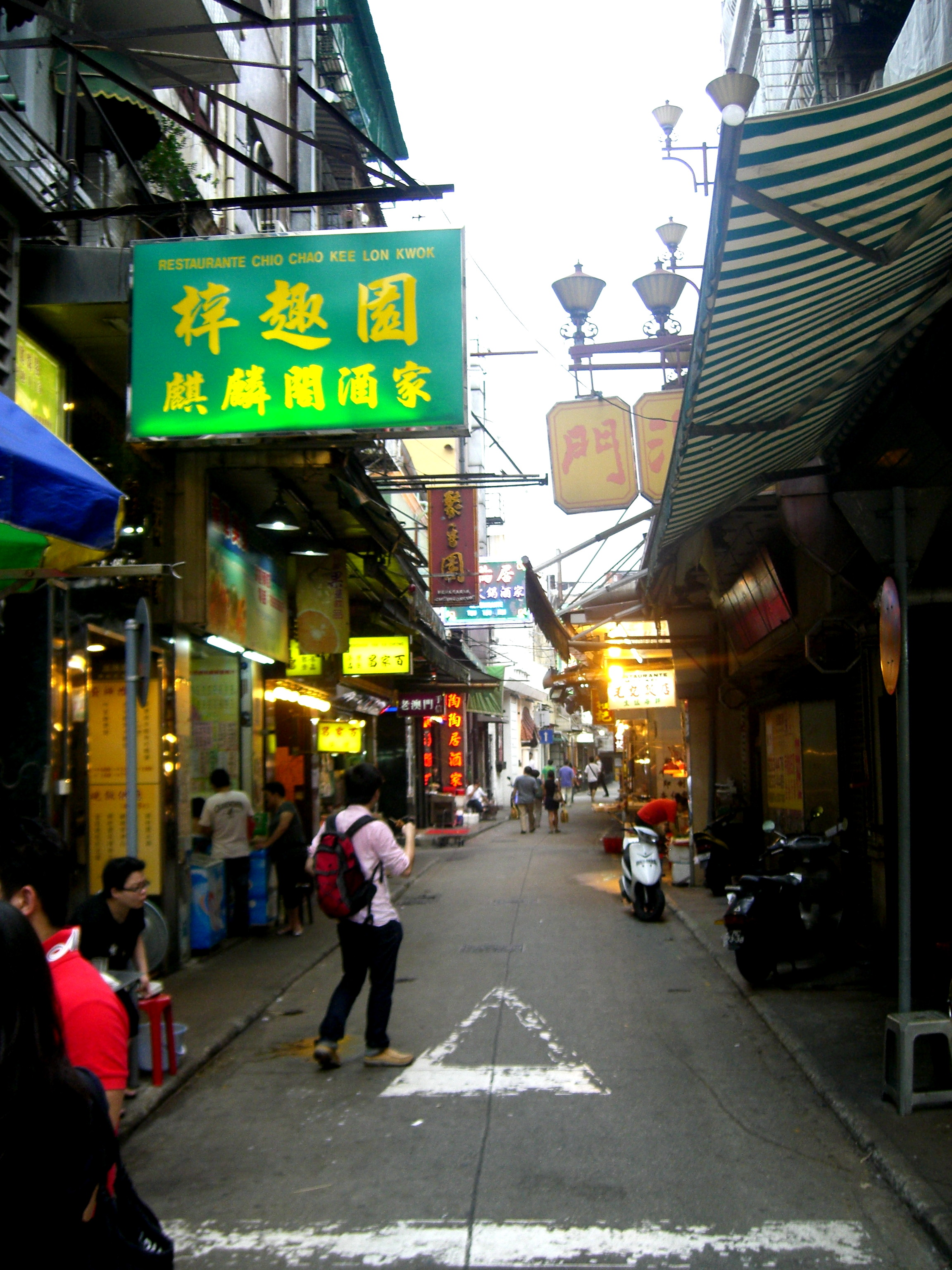 Travessa do Mastro